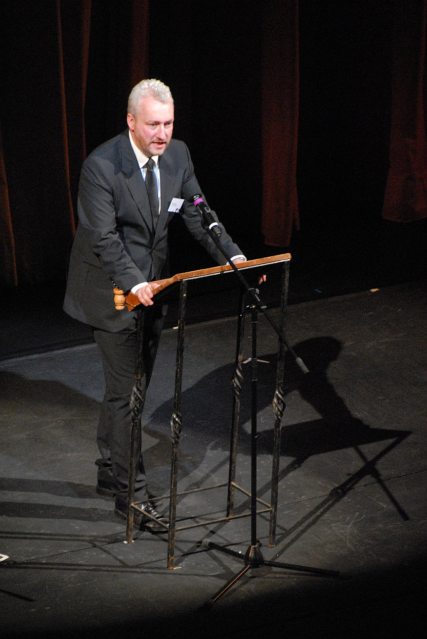 Generalintendant Peter Spuhler beim Spielzeitcocktail des Theaterfests 2011 am Badischen Staatstheater Karlsruhe